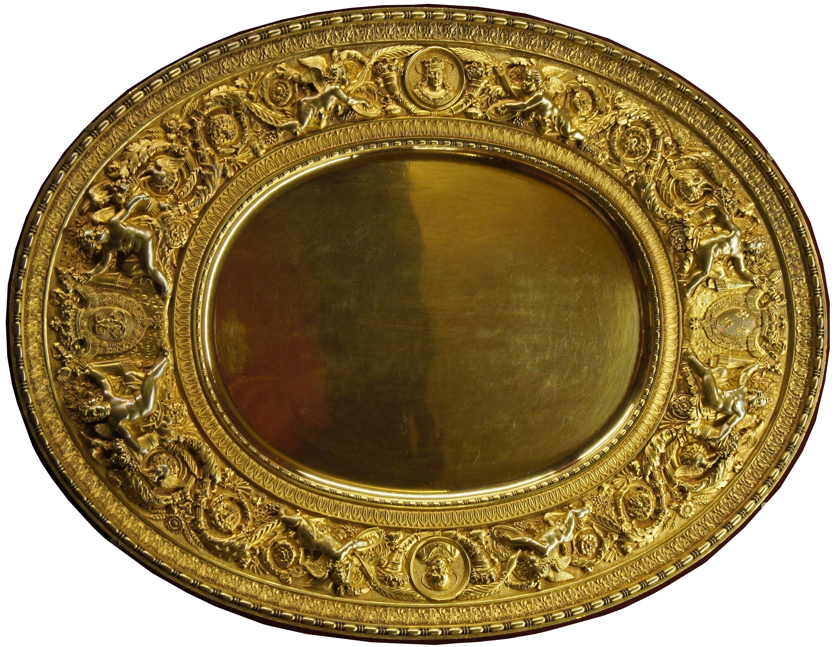 Reims (Marne, France), palais du Tau, bassin à ablutions en vermeil, faisant partie du service du sacre de Charles X. Jean-Charles Cahier (1772–1857) DescriptionFrench goldsmithDate of birth/death 1772 17 October 1857 Location of birth/death Soissons MarseilleWork location Paris (1801–1830) Authority control : Q62909316 VIAF: 207258240 SUDOC: 136545742 creator QS:P170,Q62909316